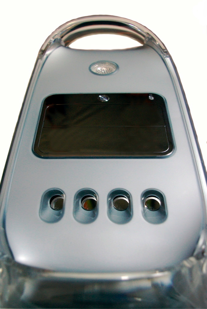 Frontansicht eines PowerMac G4 Quicksilver MDD (hier FW800)